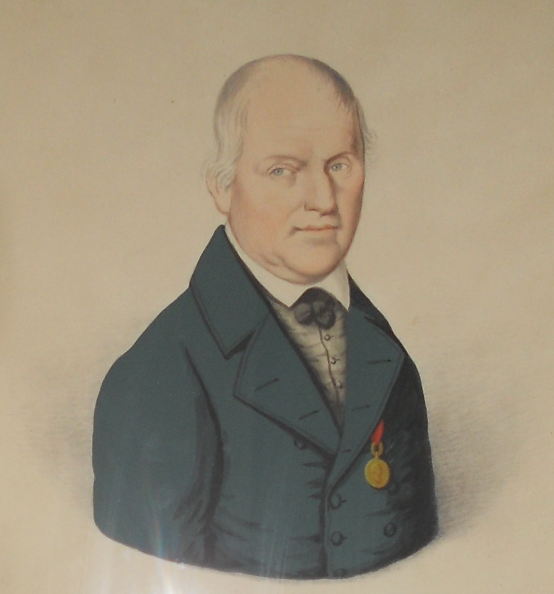 Josef Stecher, Bürgermeister, Schützenhauptmann, Landtagsabgeordneter, Freiheitskämpfer 1809